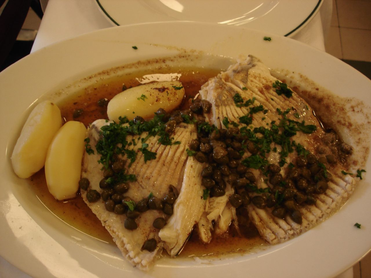 MorganeC